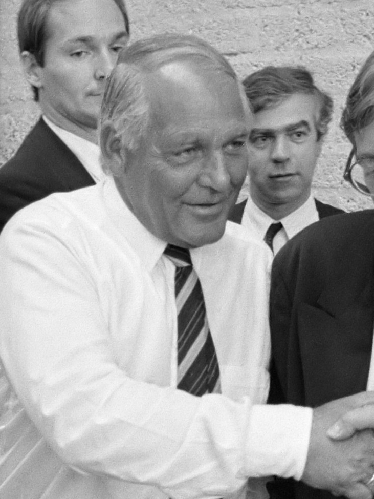 Veiling Oriental Palace in Breukelen in sporthal; G. A. van der Valk wordt gefeliciteerd met koop 29 juli 1988